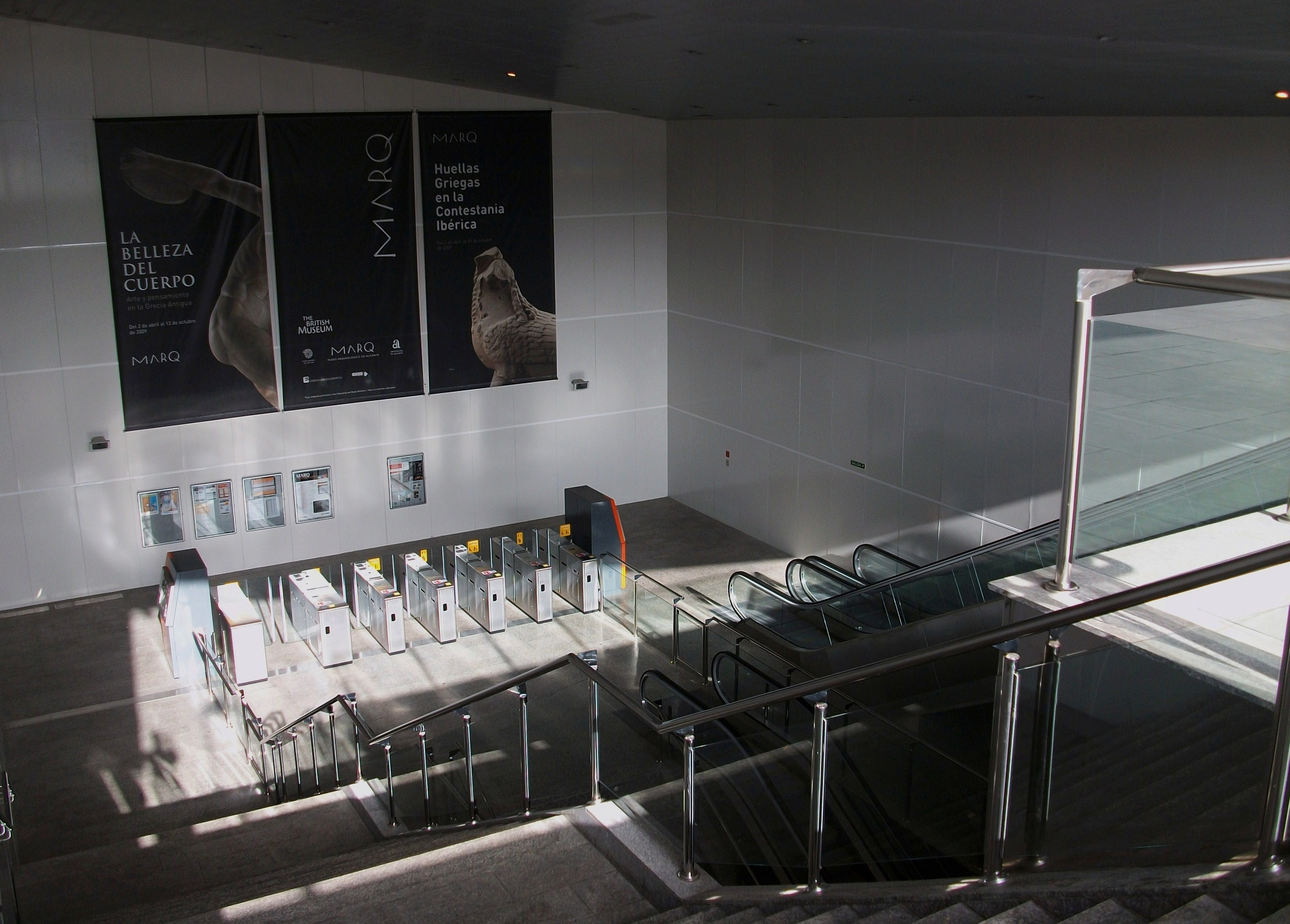 Baixada a l'estació del MARQ, Alacant.